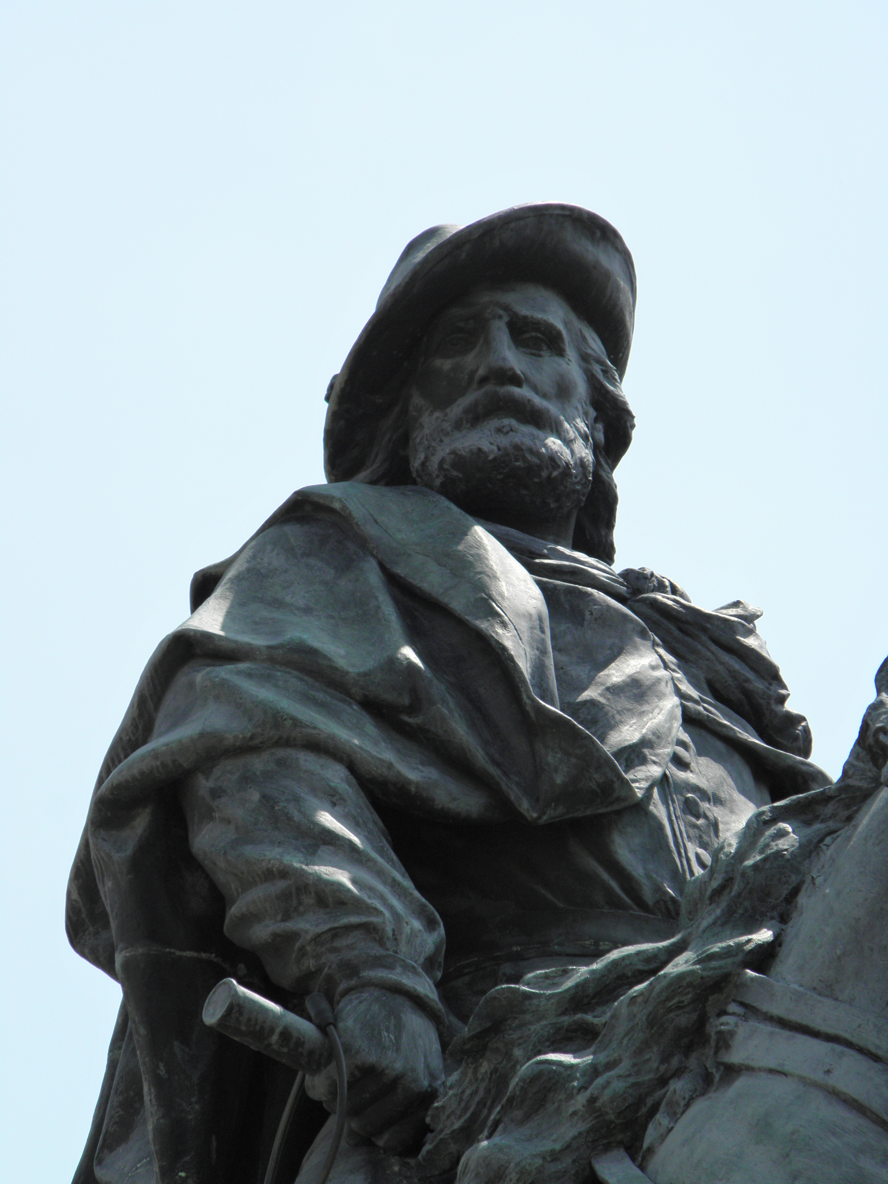 Monumento equestre dedicato a Giuseppe Garibaldi sito a Rovigo nell'omonima piazza, opera di Ettore Ferrari.